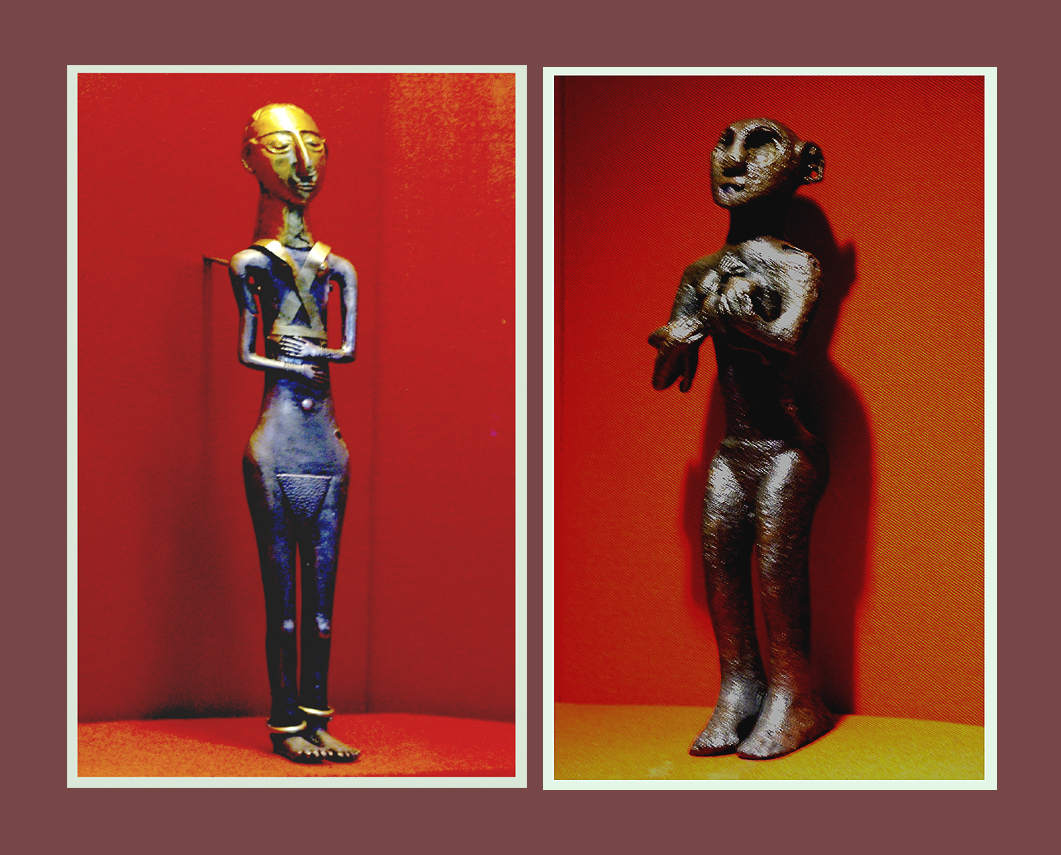 Ikeristennők a kora bronzkorból (Anatóliai Civilizációk Múzeuma, Ankara, Törökország)